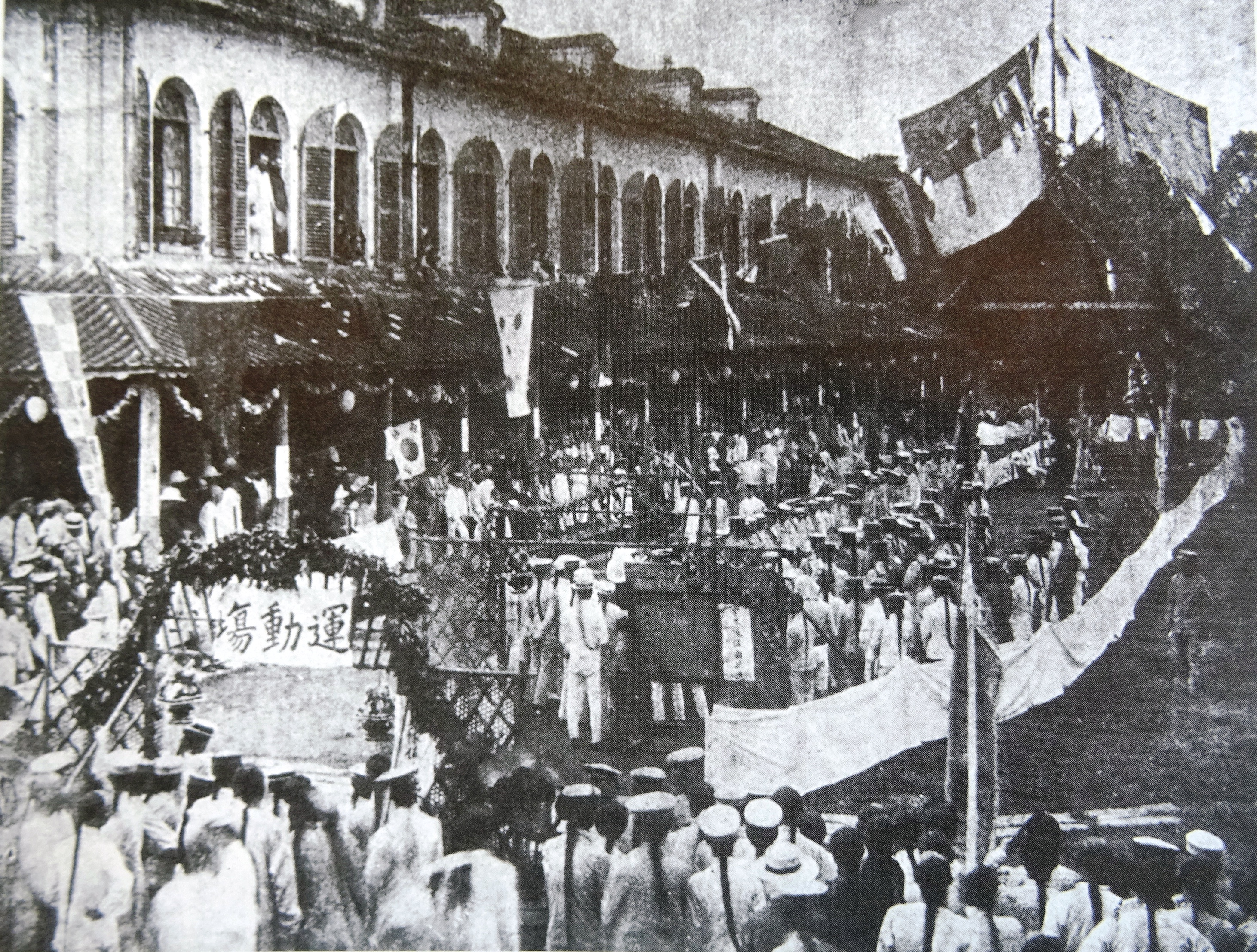 粵語: 1907年廣州大新路嘅聖心書院嘅校運會